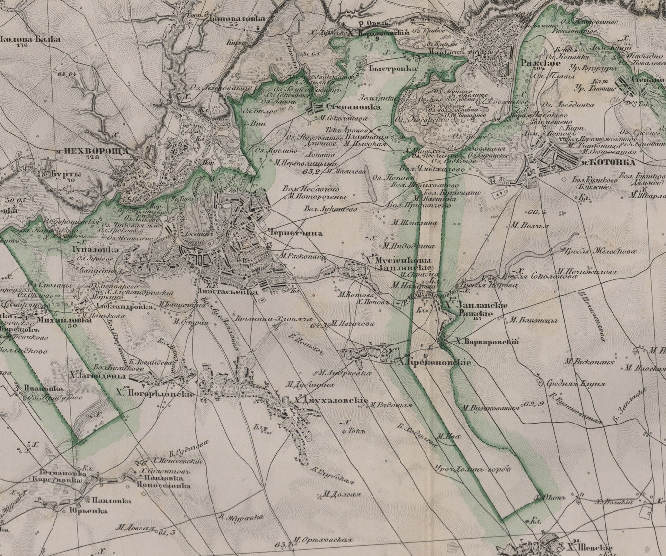 Фрагмент військово-топографічної карти (ряд ХХV, лист 13) складеної військово-топографічним штабом у Санкт-Петербурзі. Так звана "трьохверстовка". Редакція 1869 року. Зображення заплавських хуторів та оточуючих поселень.